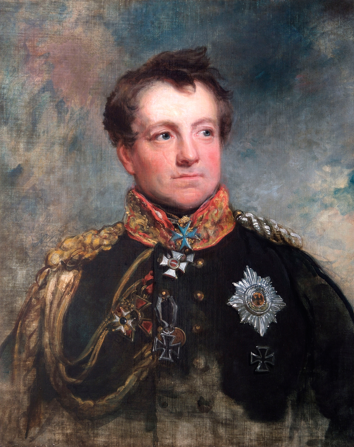 Portrait des preußischen Generalfeldmarschalls August Neidhardt von Gneisenau (1760–1831), hier dargestellt in der Uniform eines Generals und etwa zur Zeit des Sieges von Schlacht bei Waterloo (18. Juni 1815). Das Gemälde misst 72,7 x 57,8 cm und besteht aus Ölfarben auf Leinwand. Es entstand wahrscheinlich 1818 in Cambrai, wo der Künstler beim Jahrestagstreffen der Alliierten anwesend war.